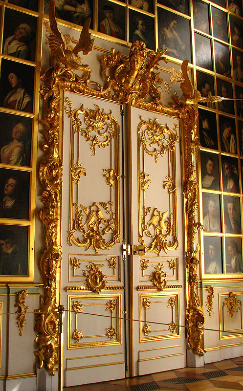 Десюдепорт в Картинном зале Петергофского дворца